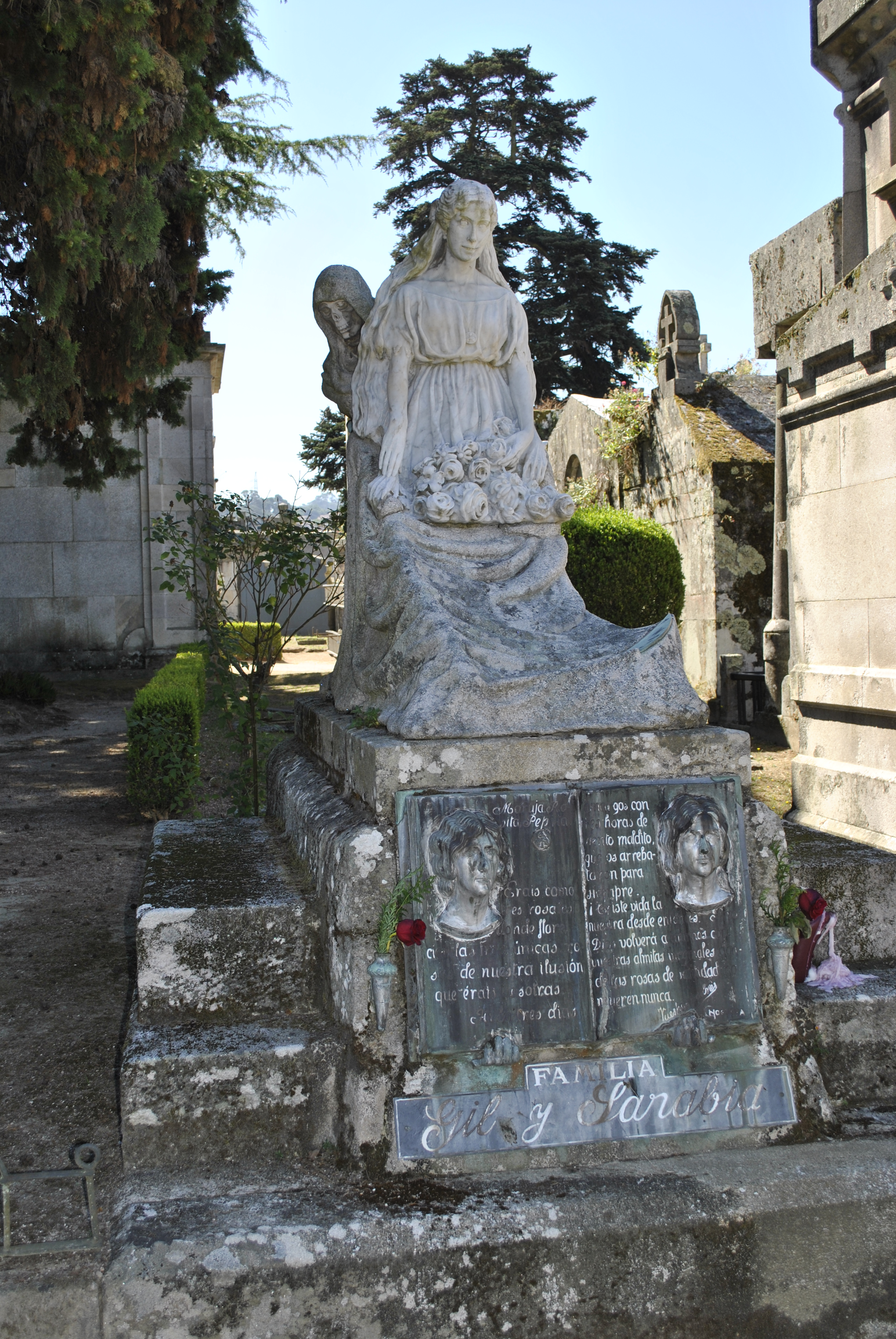 Pereiró, Asorey (3).jpg